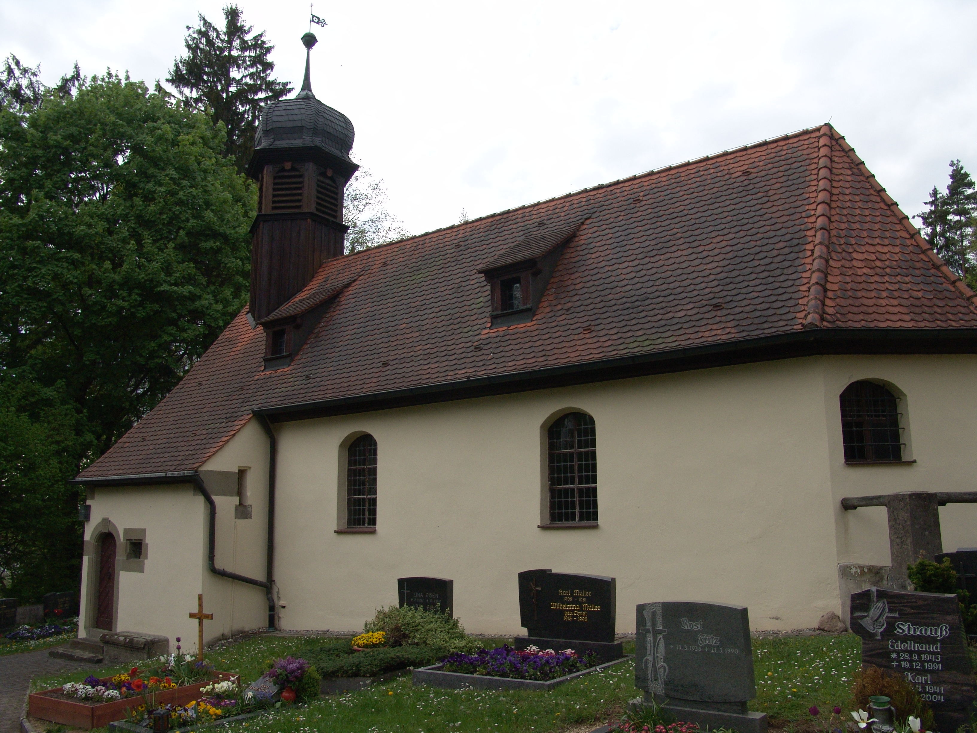 evang.-luth. Kirche St. Stephanus in Greiselbach